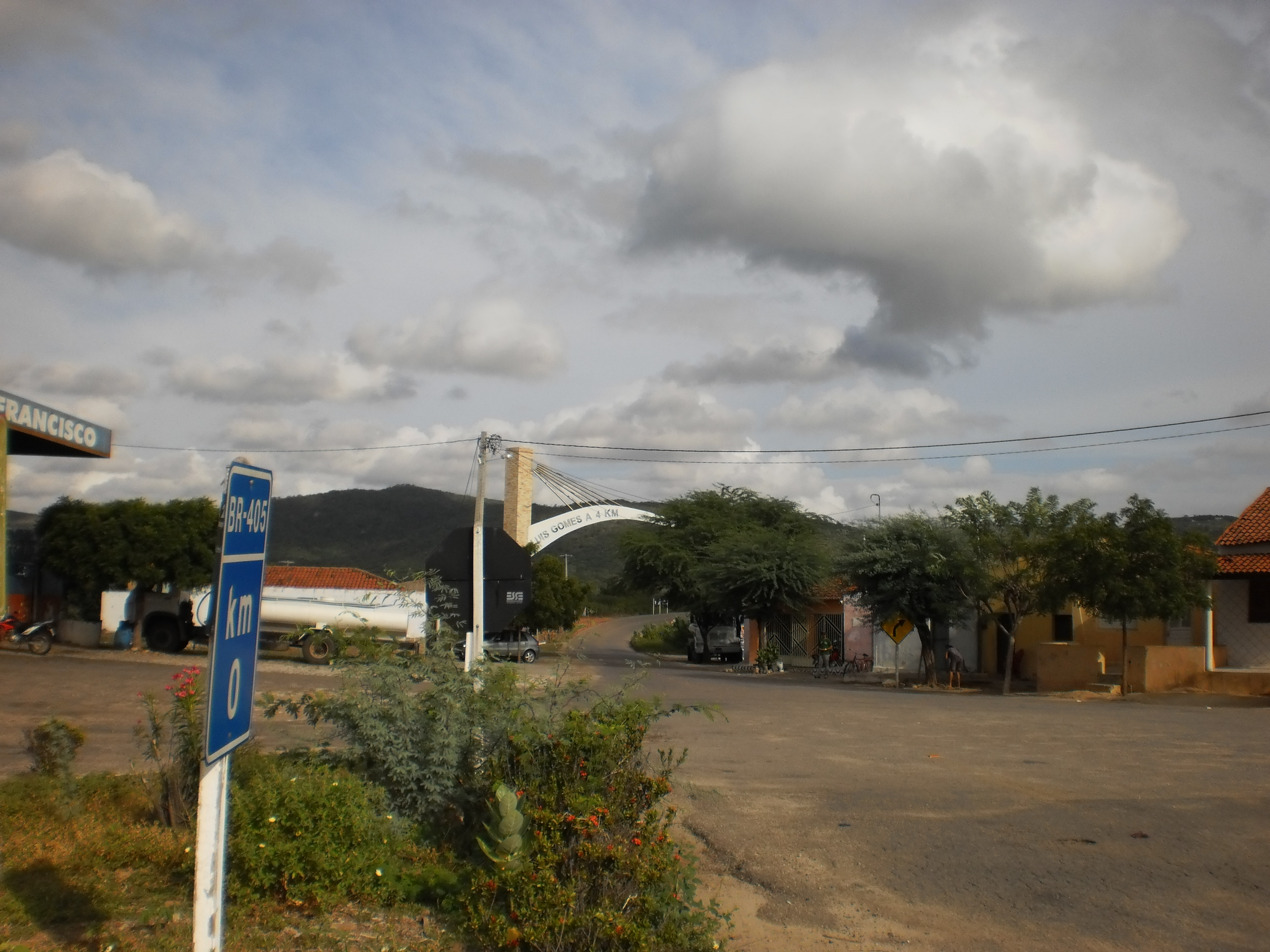 Entrada para Luís Gomes, Rio Grande do Norte, Brasil, próximo à divisa com a Paraíba.